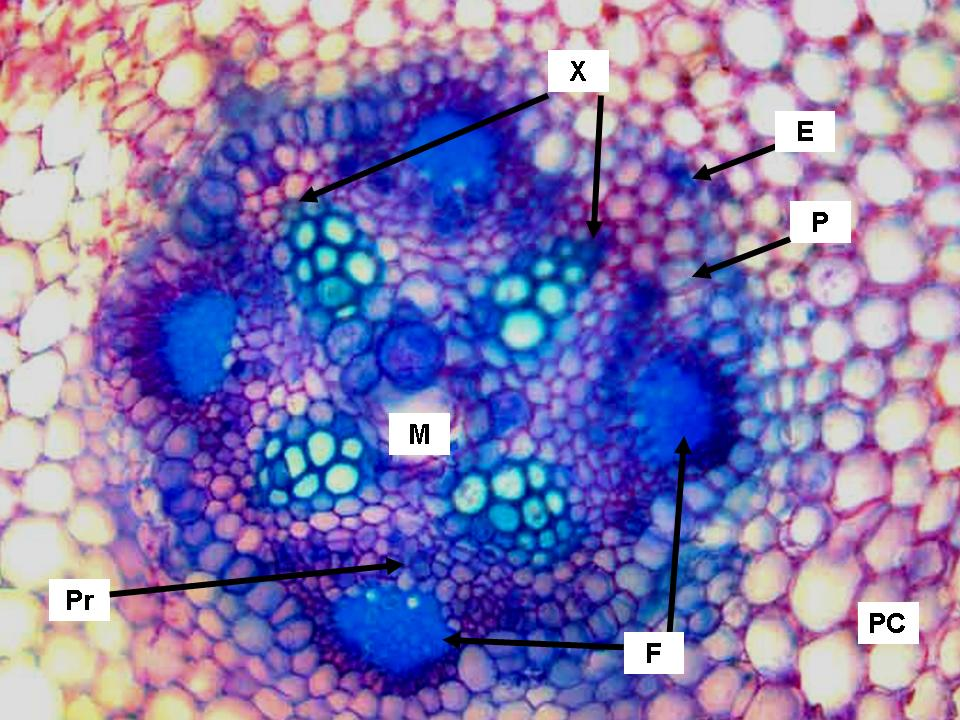 Cilindro vascular en corte transversal de raíz primaria de poroto (Phaseolus). PC, Parénquima cortical o córtex; E, Endodermis; P, Periciclo; X, Xilema; F, Floema; Pr, Procámbium; M, Médula.